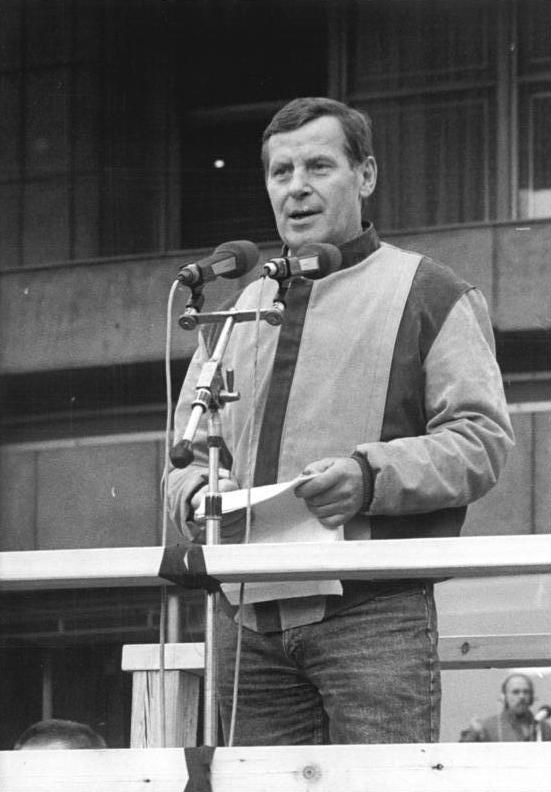 ADN-ZB Link 4.11.89 Berlin: Demonstration 500.000 Bürger beteiligten sich an einer Demonstration für den Inhalt der Artikel 27 und 28 der Verfassung der DDR. Auf dem anschließenden Meeting auf dem Alexanderplatz ergriff auch der Rektor der Hochschule für Film und Fernsehen, Prof. Dr. Lothar Bisky, das Wort.